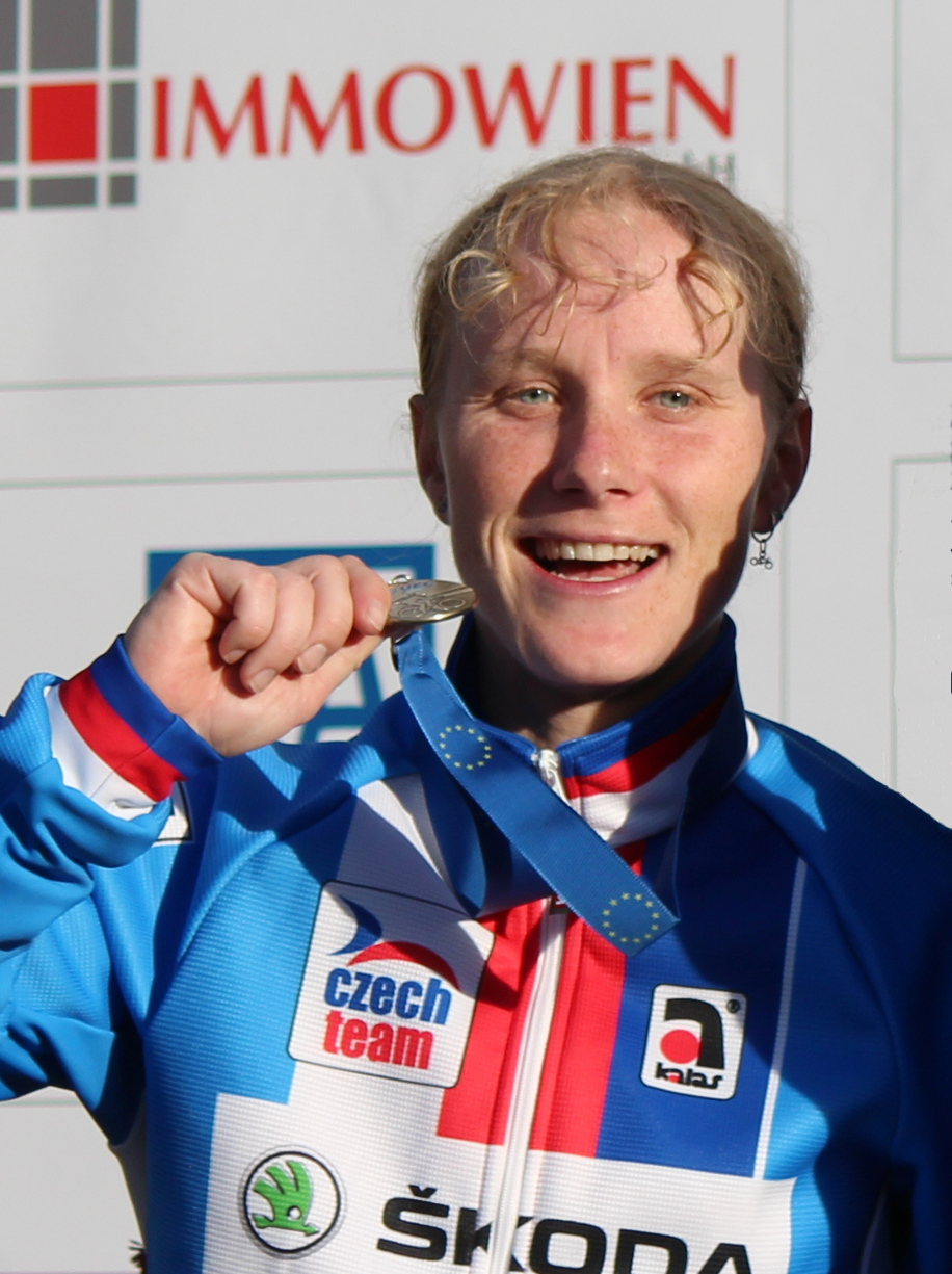 Pavla Havliková